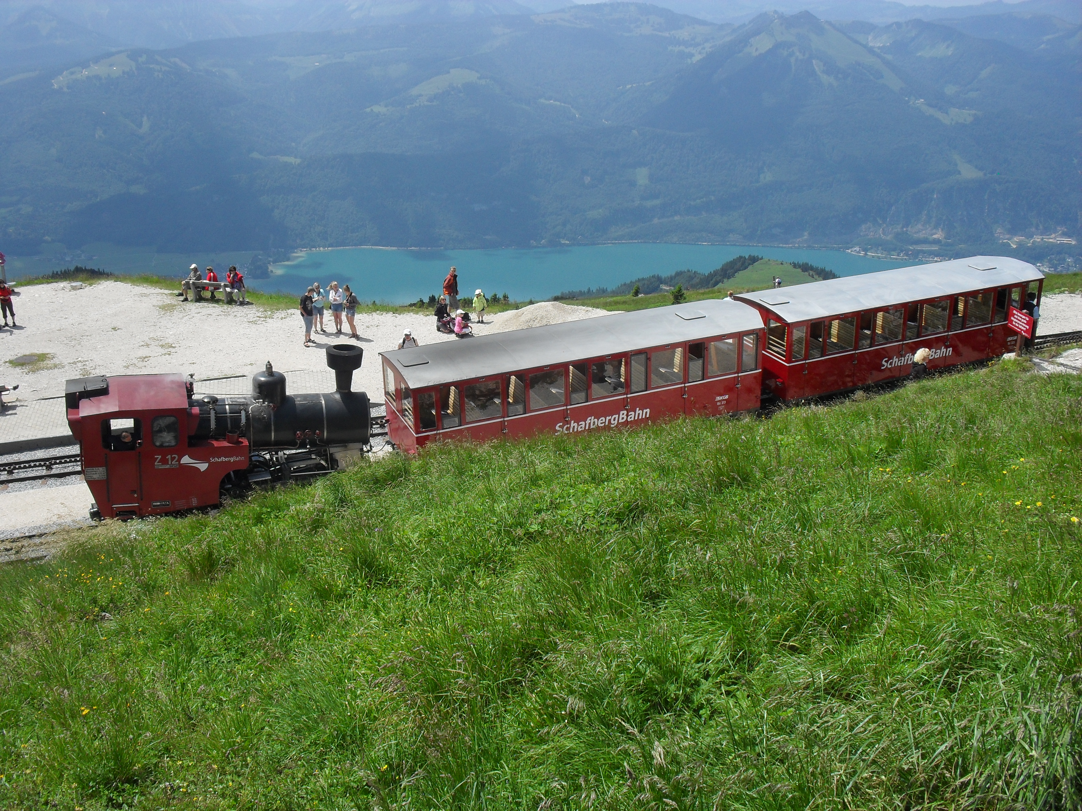 Schafbergbahn und Wolfgangsee